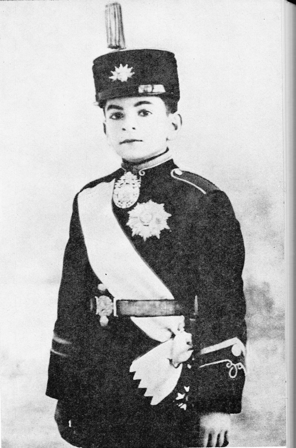 Le prince héritier d'Iran Mohammad Reza, vers 1926